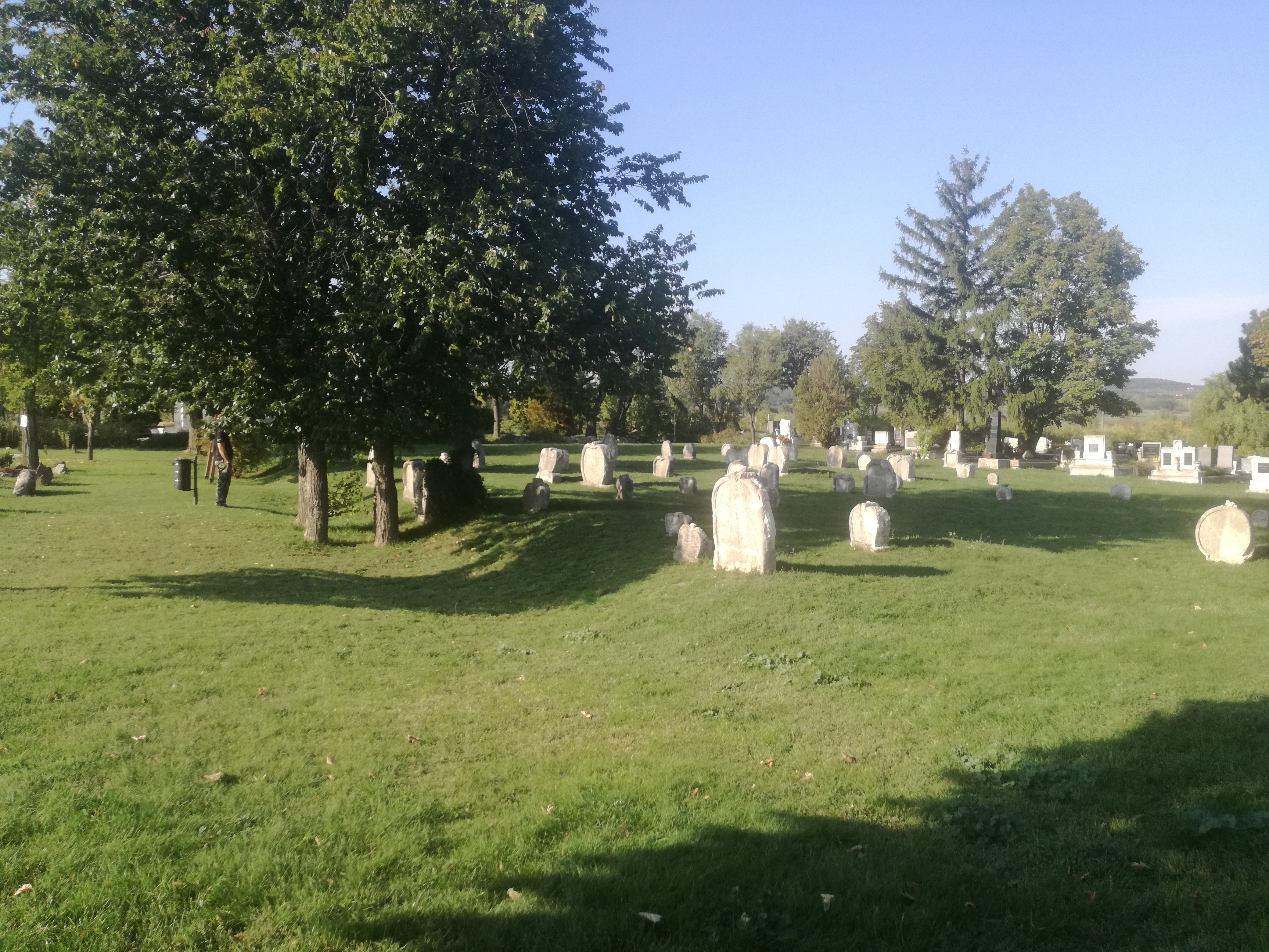 Balatonudvari műemlék temetője a község egyik látványossága. A temetőt az 1770-80-as években nyitották meg a református és római katolikus hívek számára.